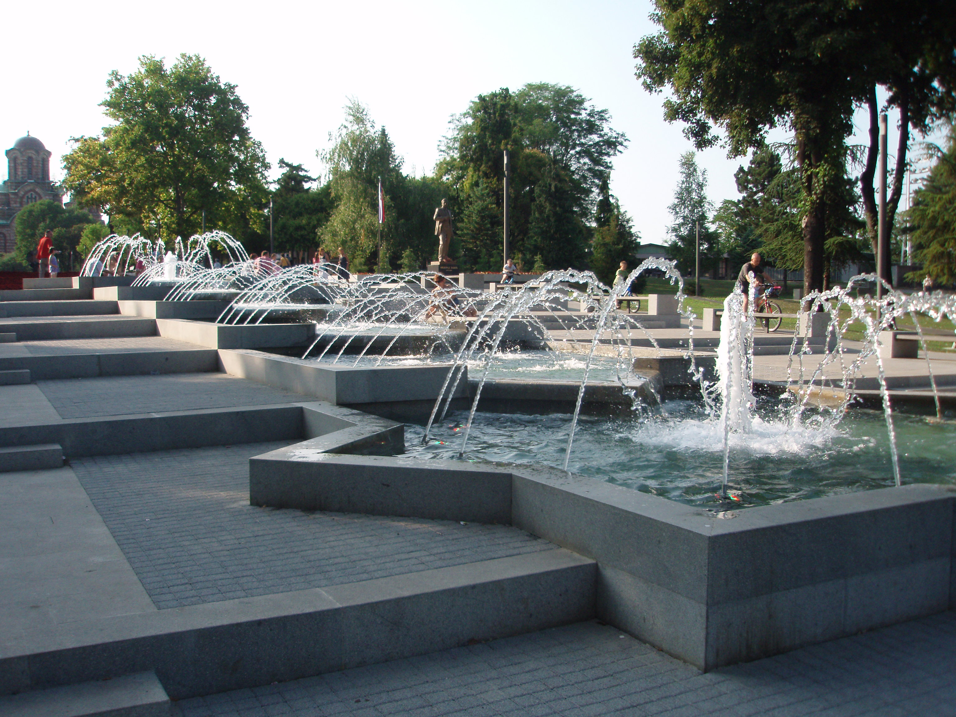 Muzička fontana u Tašmajdanskom parku